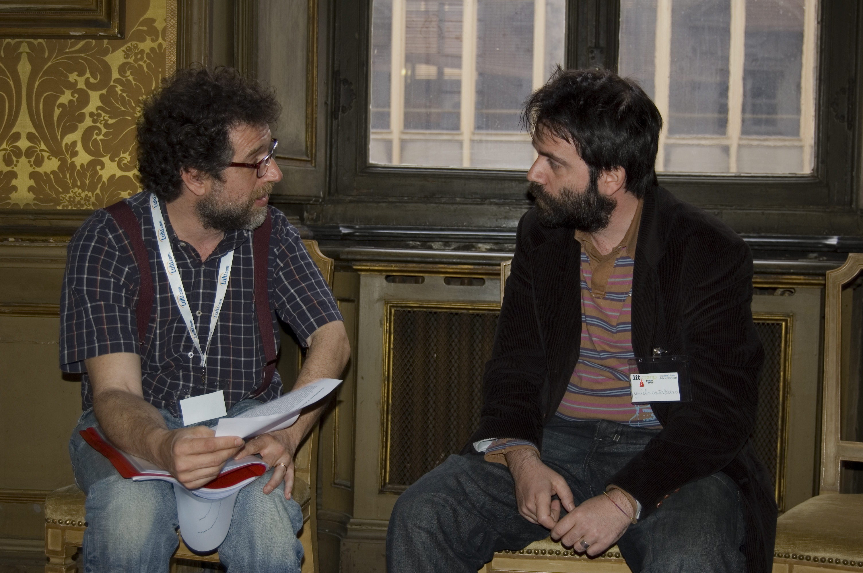 Guido Catalano